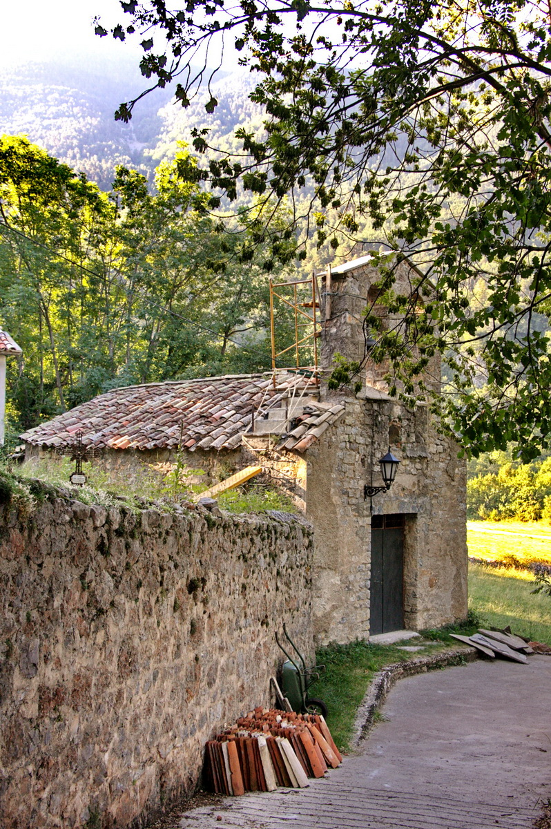 Església de Sant Miquel a Abí (la Franja-Osca)